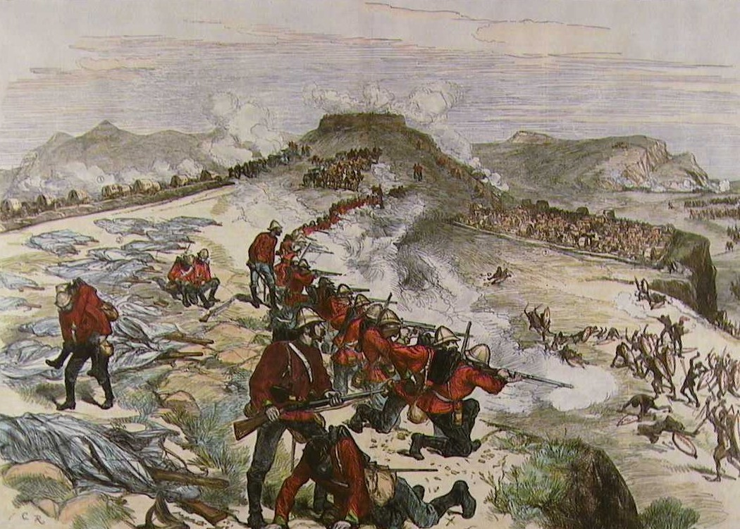 Bataille de Kambula. Gravure parue en mars 1879 dans l'Illustrated London News